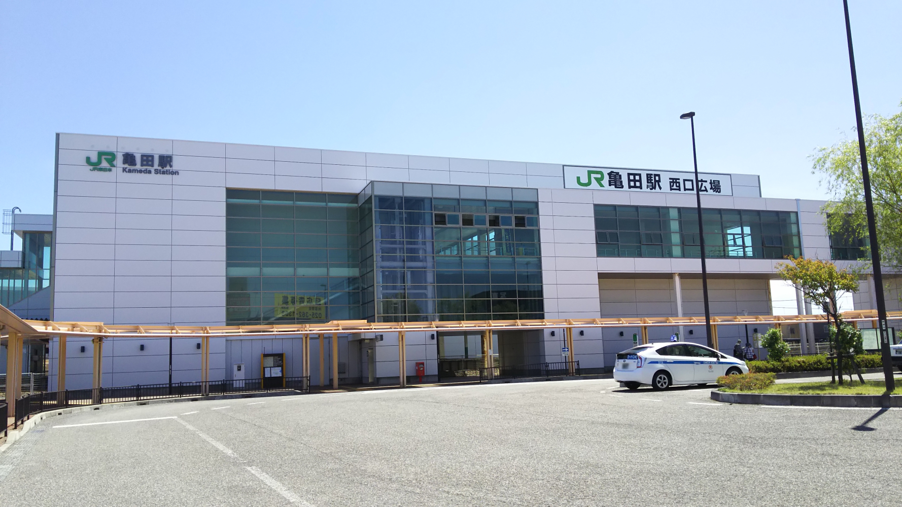 亀田駅西口201806